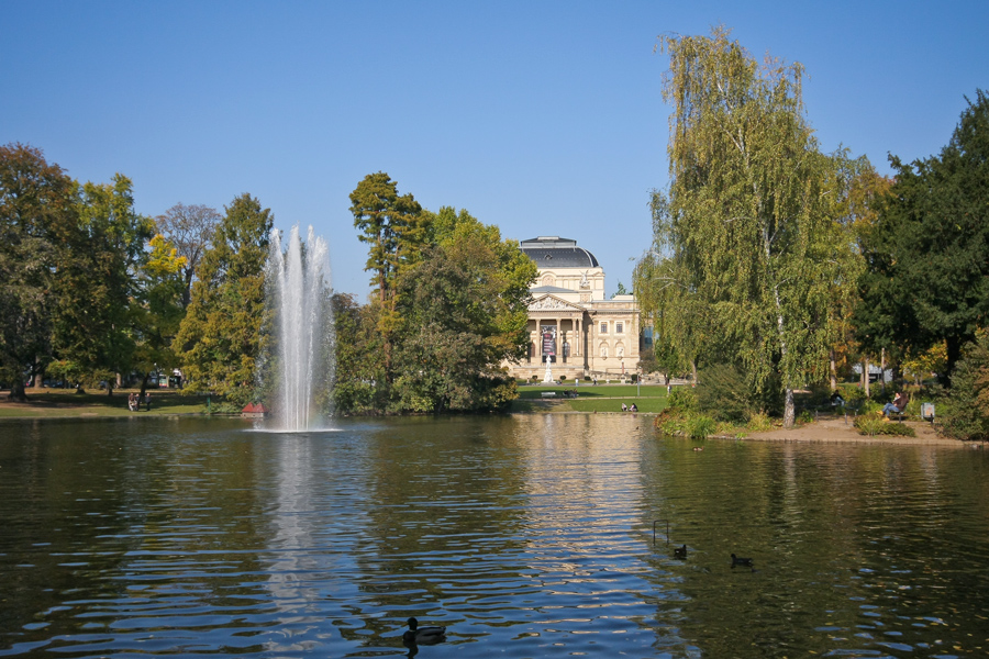 Großer Teich des Warmen Damms in Wiesbaden. Im Hintergrund das Hessische Staatstheater